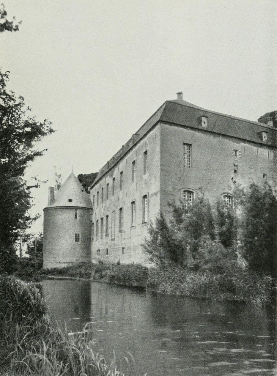 Das Herrenhauses von Schloss Hueth samt Archivturm in Rees-Bienen